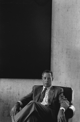 Asher Edelman, homme d'affaires et collectionneur d'art